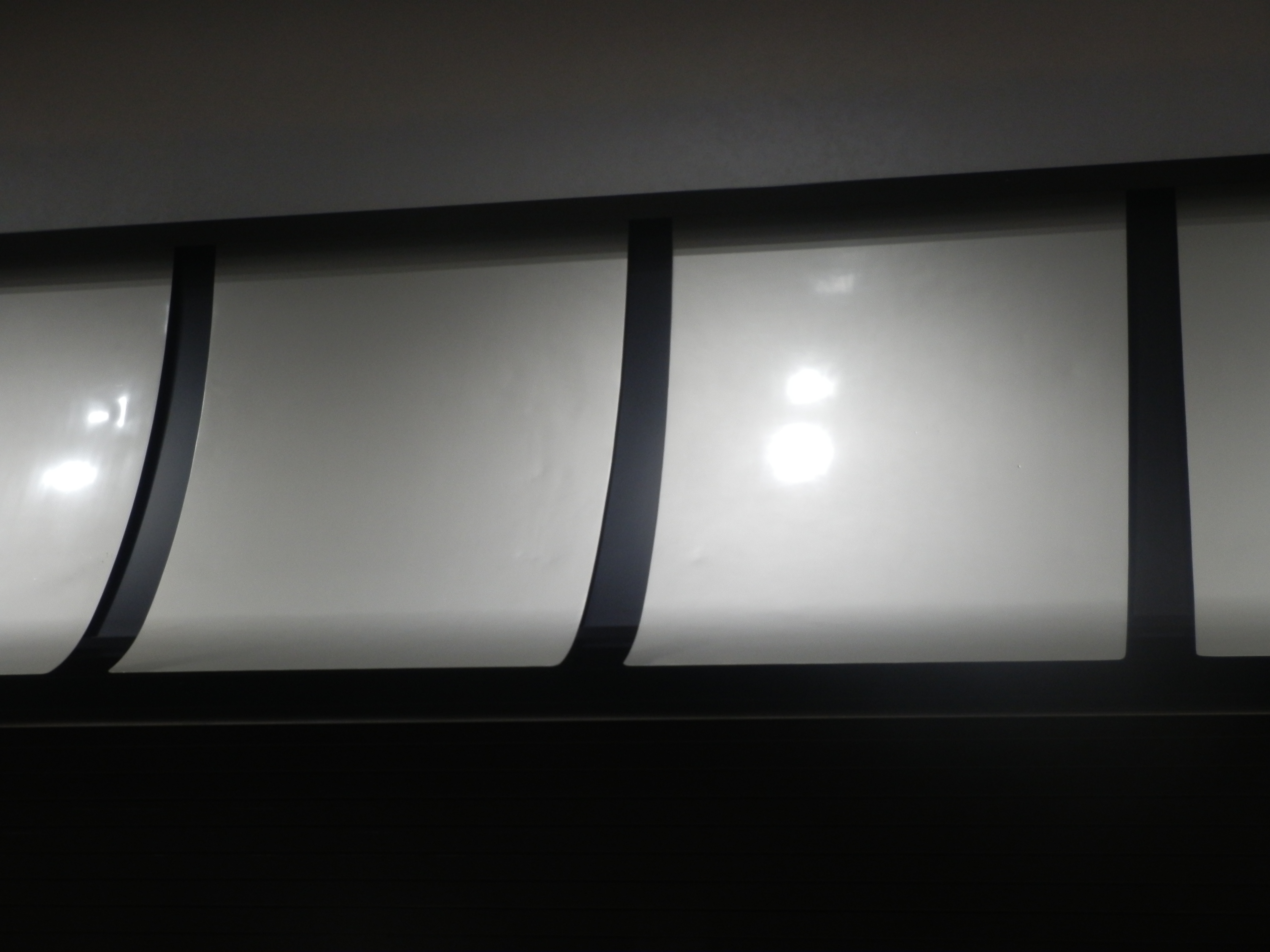 今春引退した東海道新幹線700系のアルミ車体を東京駅（JR東海管轄区）のインテリアに再利用。